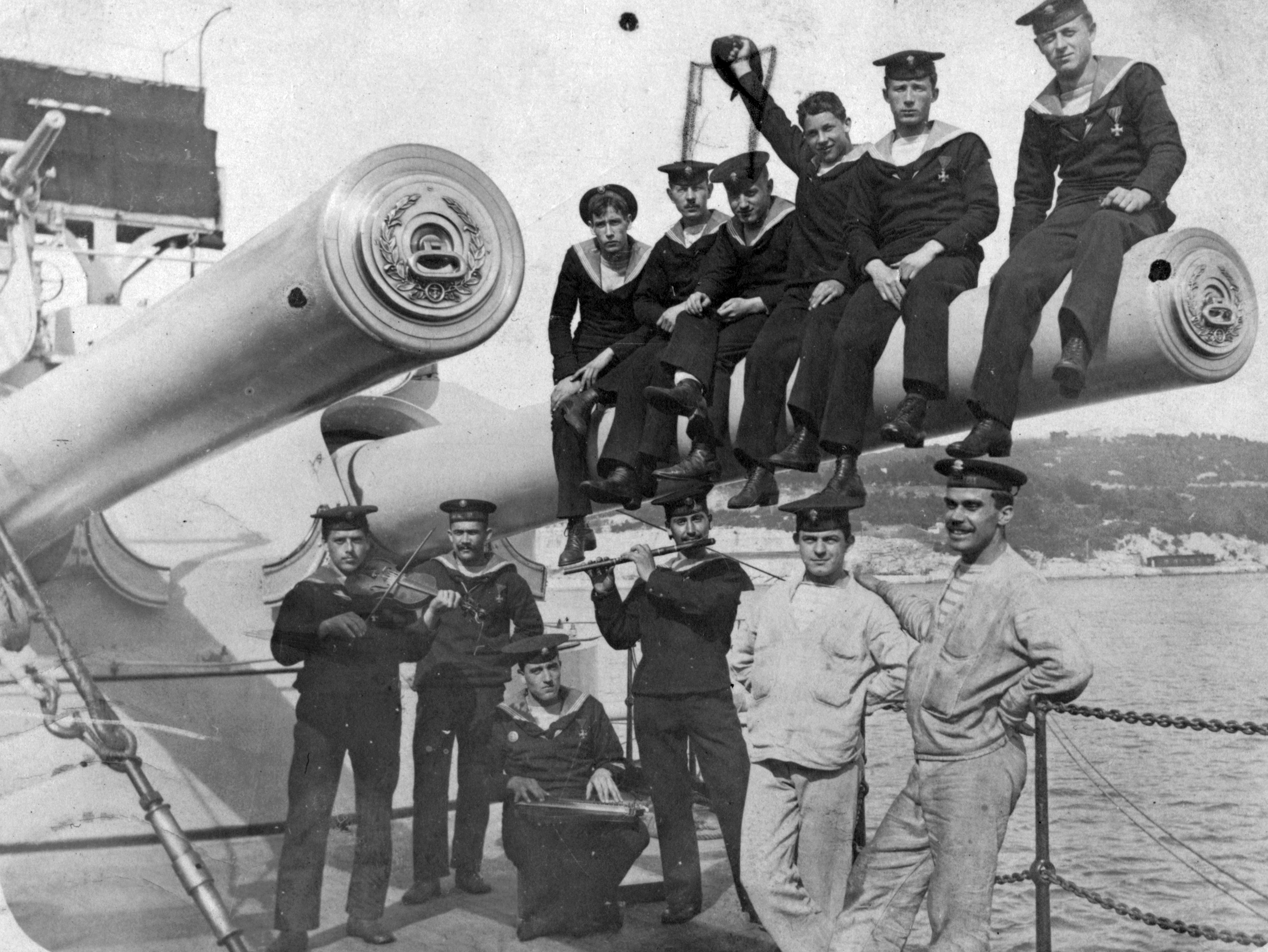 SMS Radetzky az Osztrák-Magyar Monarchia csatahajója. Tags: First World War, sailor, warship, tableau, violin, zither, flute Title: SMS Radetzky az Osztrák-Magyar Monarchia csatahajója.